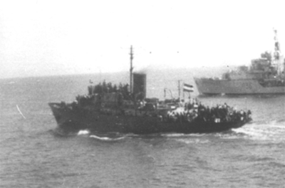 אוניית המעפילים בן הכט